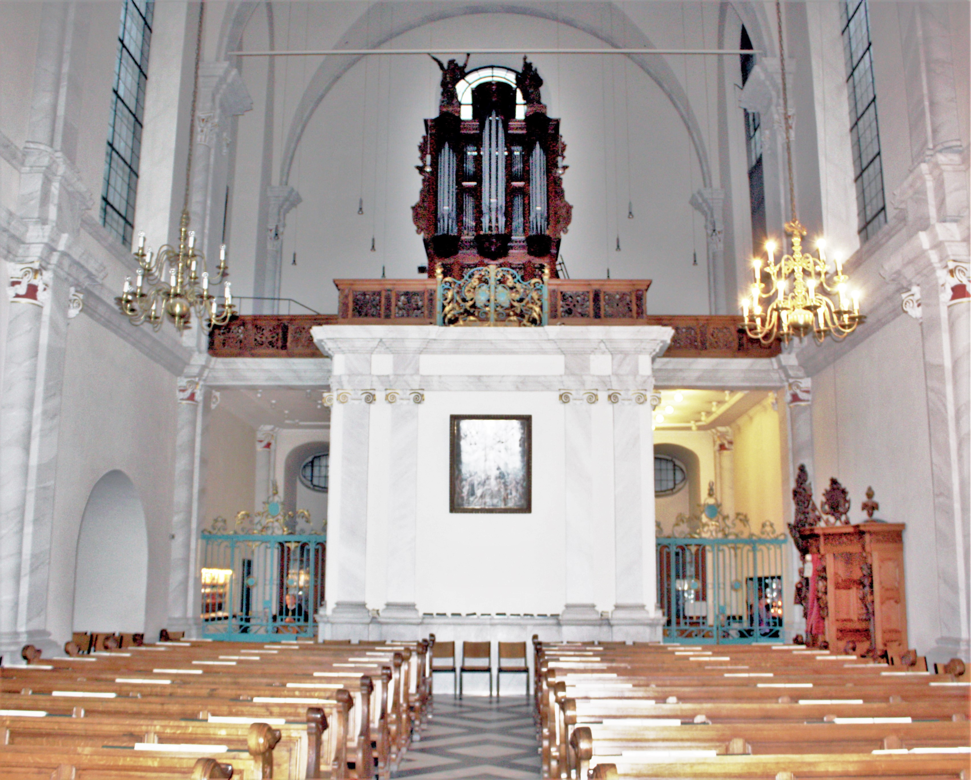 Köln, St. Maria in der Kupfergasse. Innenraum, Nordseite